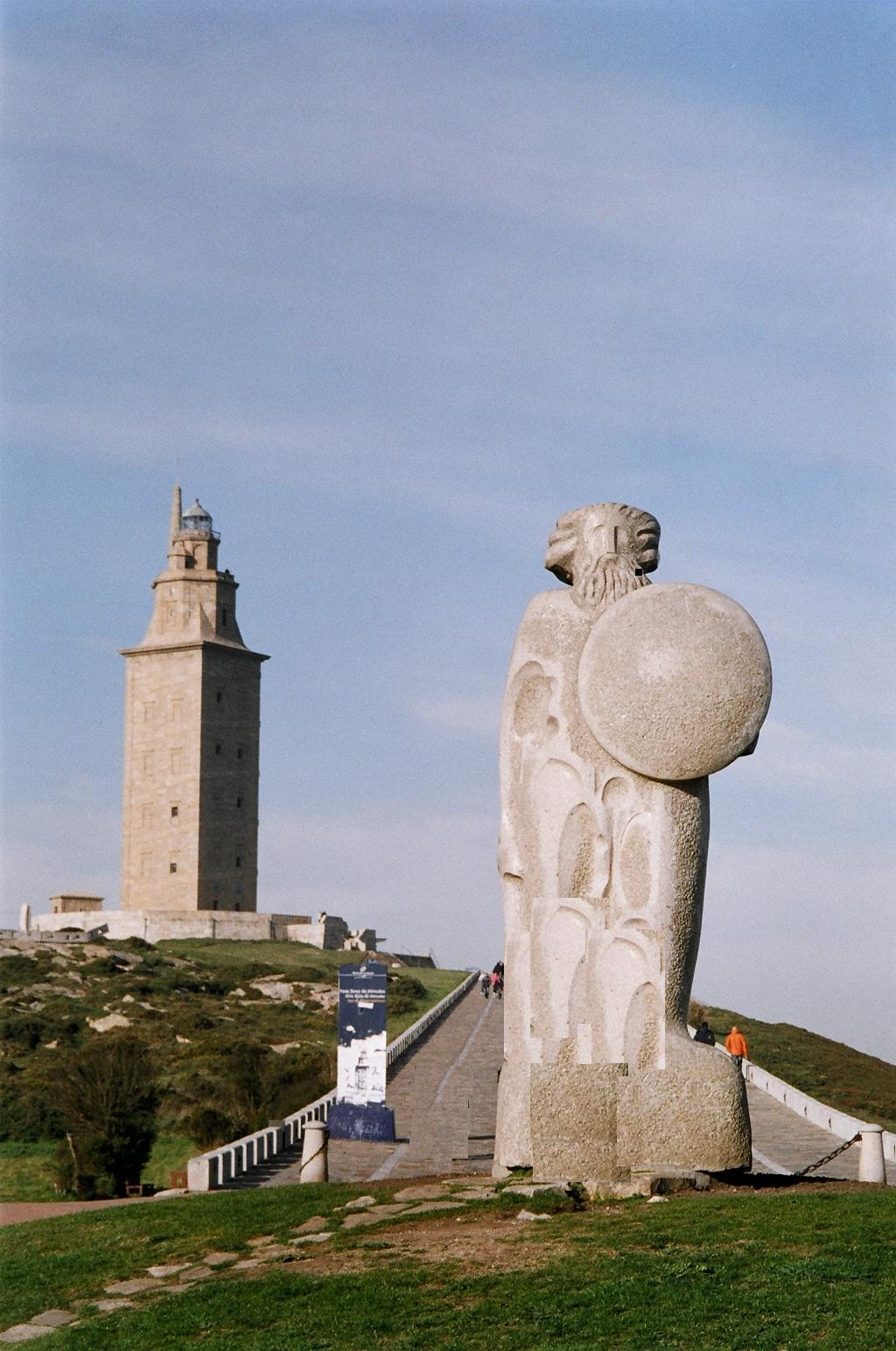 Torre de Hércules,La Coruña, España.